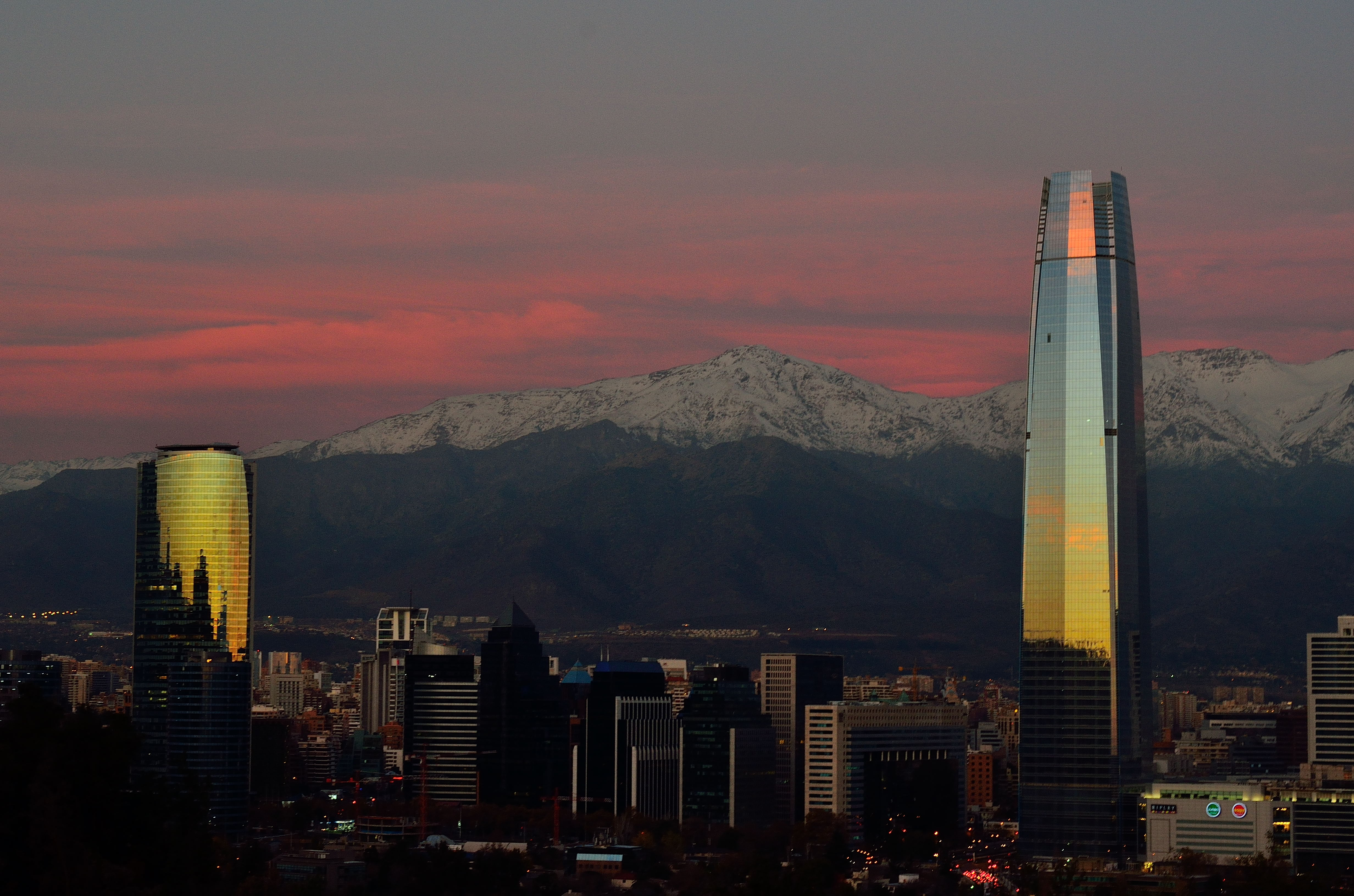 Santiago